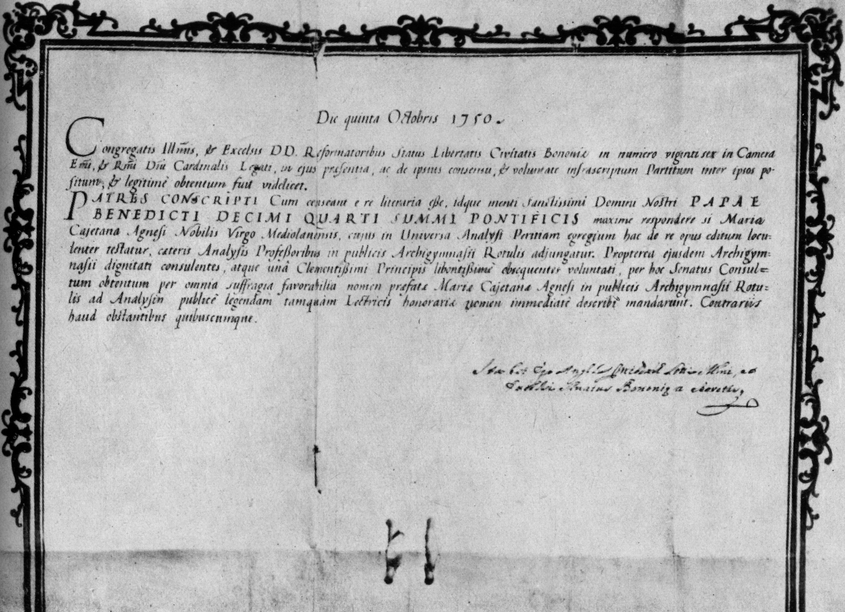 Il diploma di nomina dell' Agnesi all'Università di Bologna